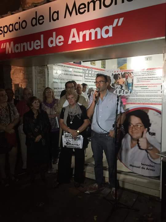 Inauguración del Espacio para la Memoria Manuel de Arma, Merlo, Provincia de Buenos Aires.